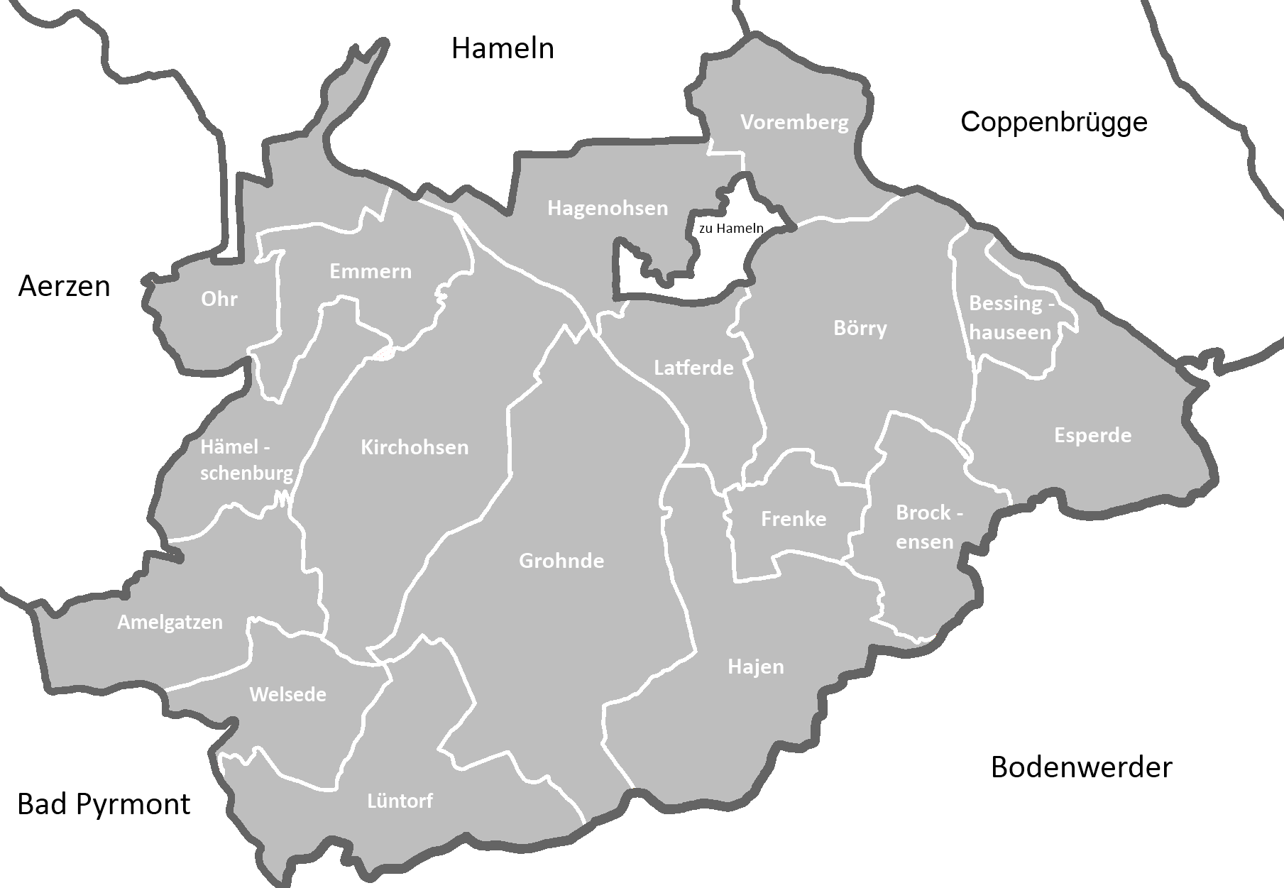 Gemarkungsgrenzen der Gemeinde Emmerthal